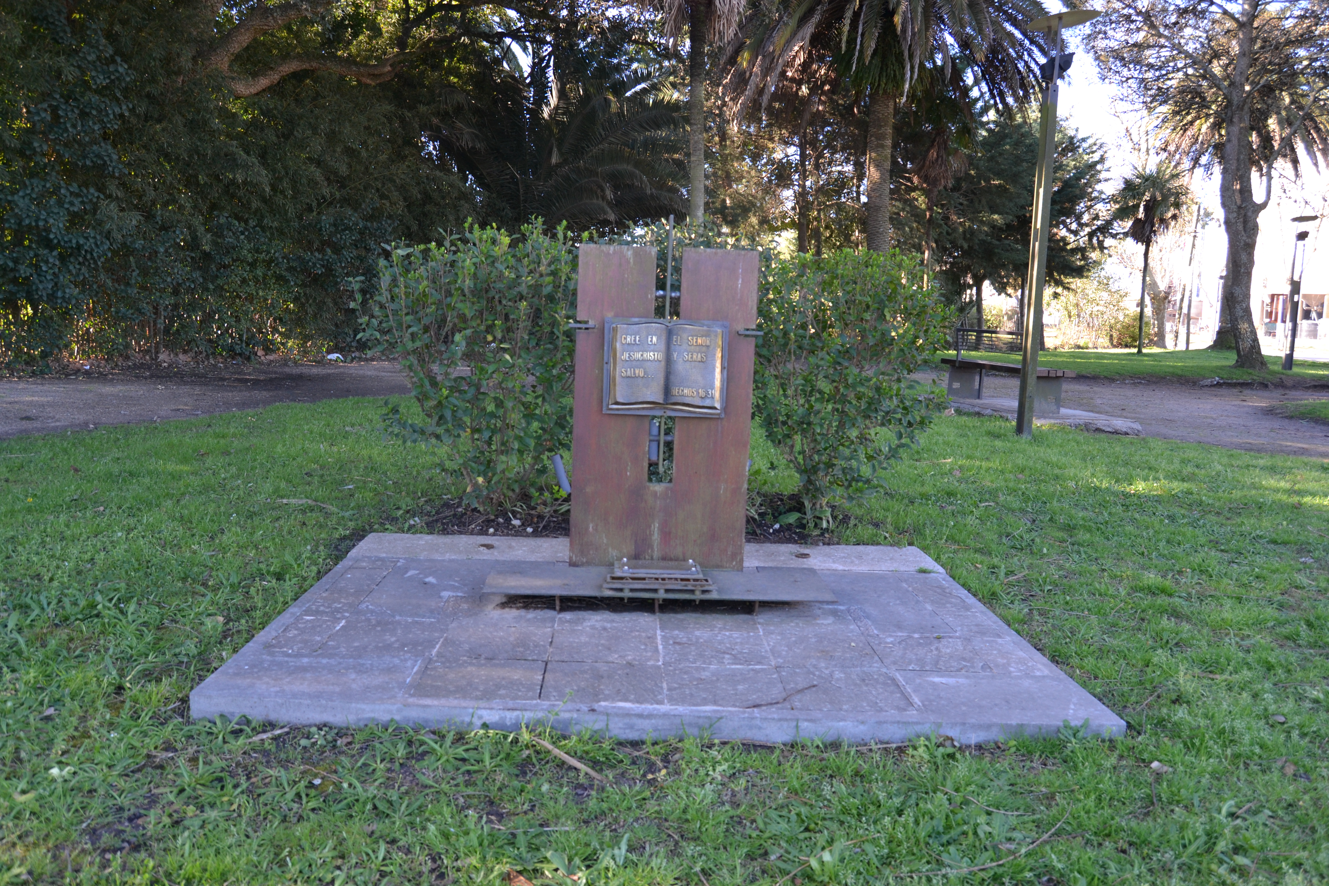 Monumento a la Biblia. Ubicada en el departamento de Flores